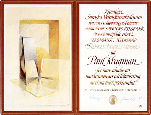 Փոր Քրուգմանի դիպլոմը